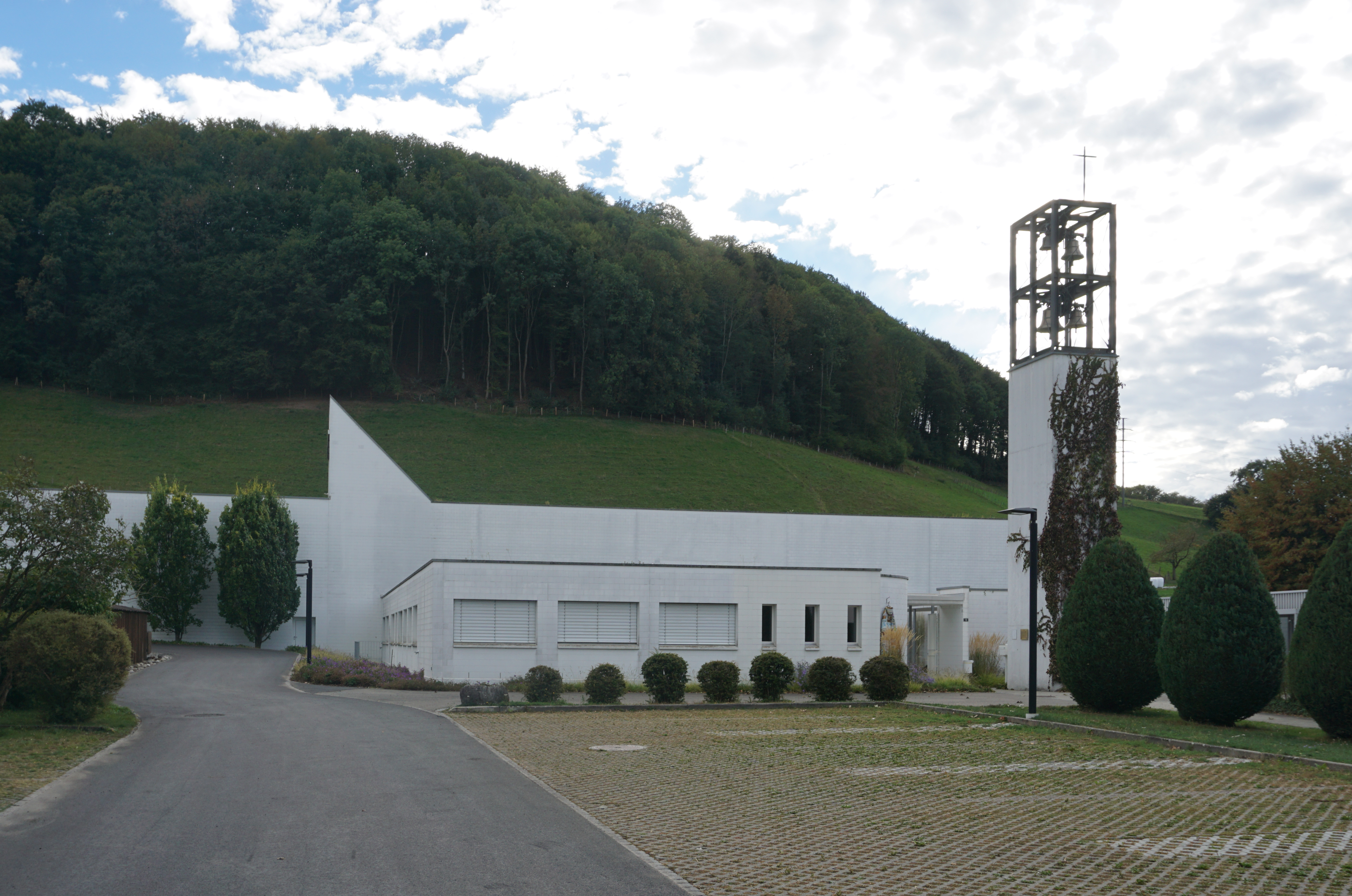 St. Martin, Nordseite